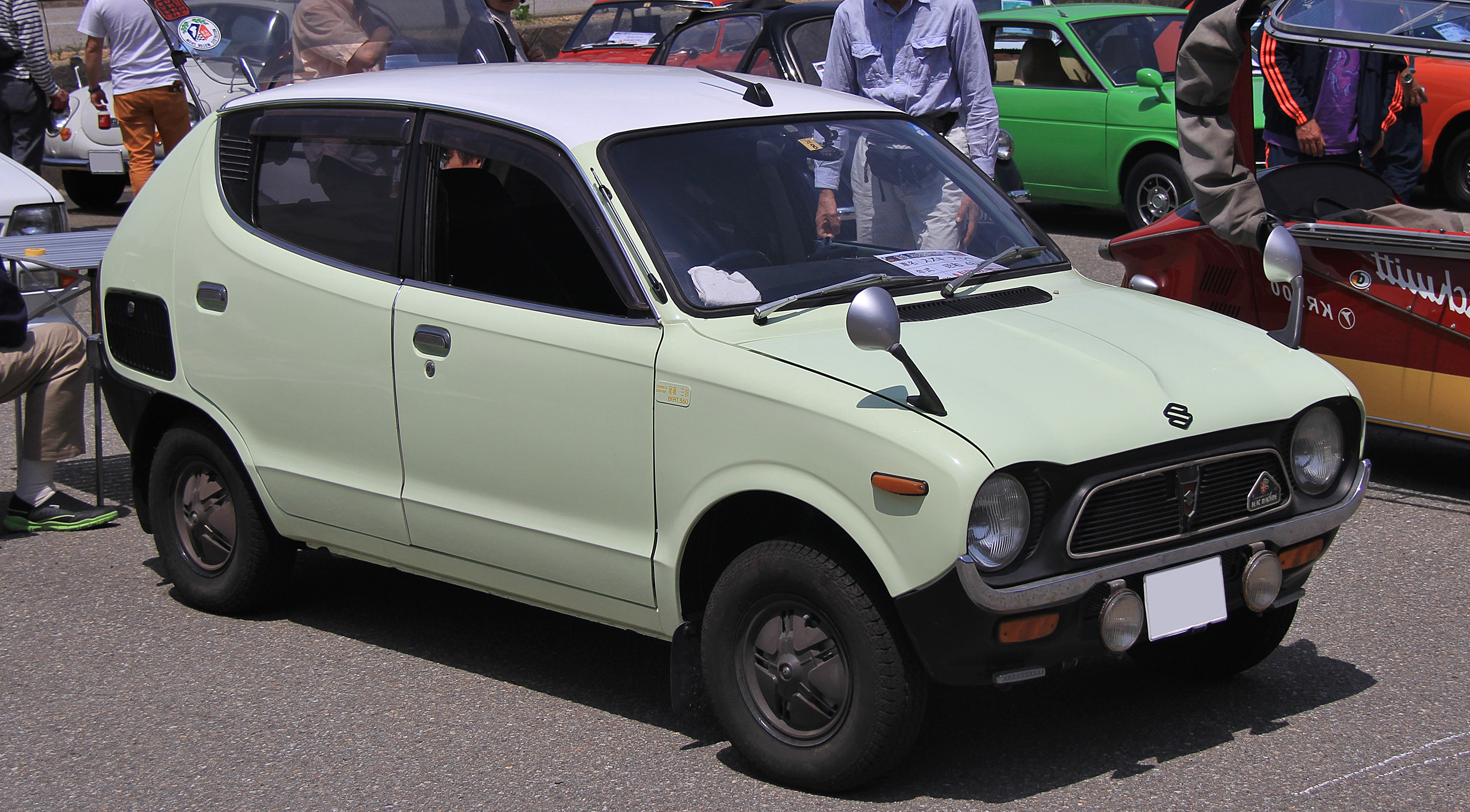 Suzuki Fronte